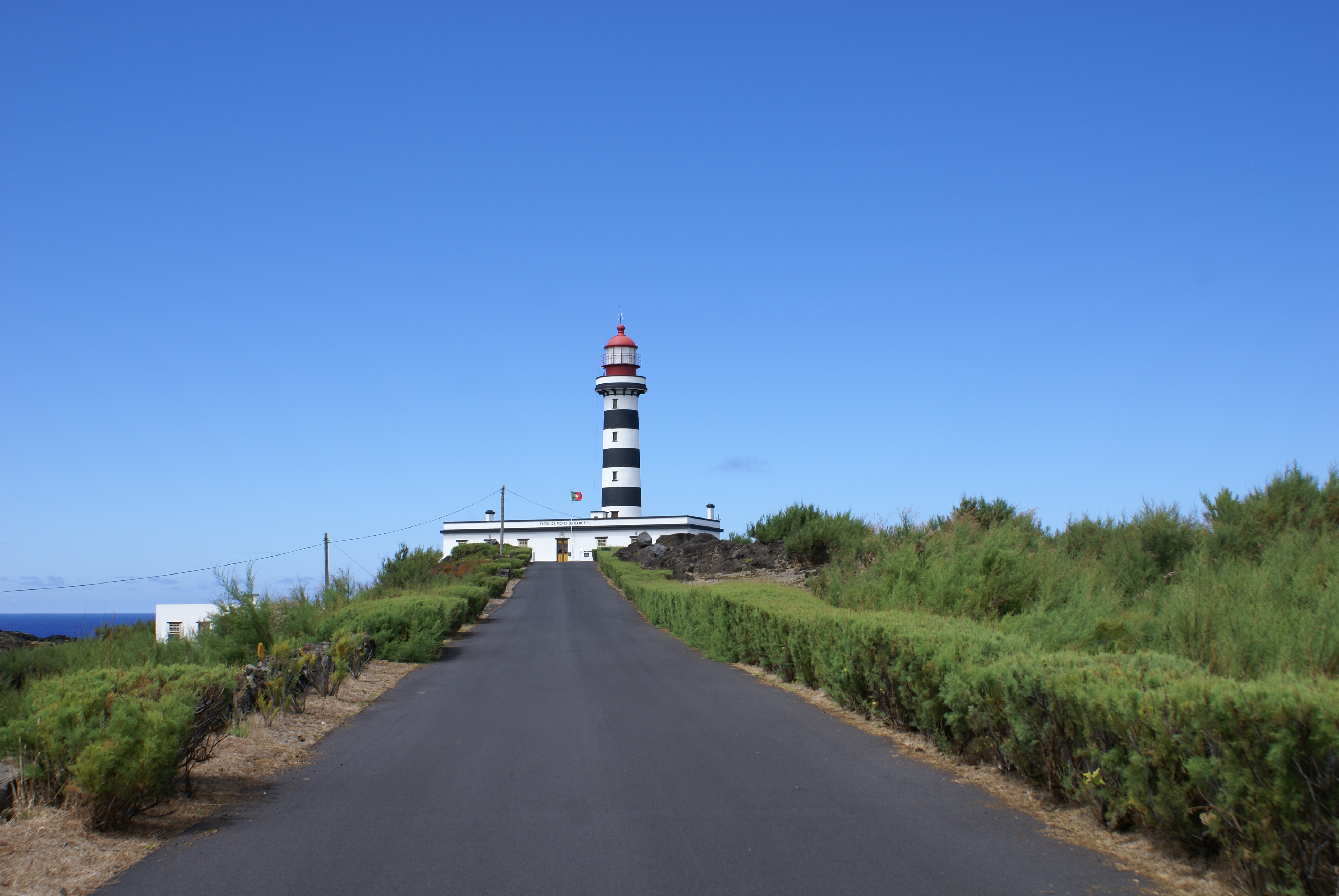 Farol da Ponta da Barca, Baía da Ponta da Barca, Santa Cruz da Graciosa, ilha Graciosa, Açores, Portugal